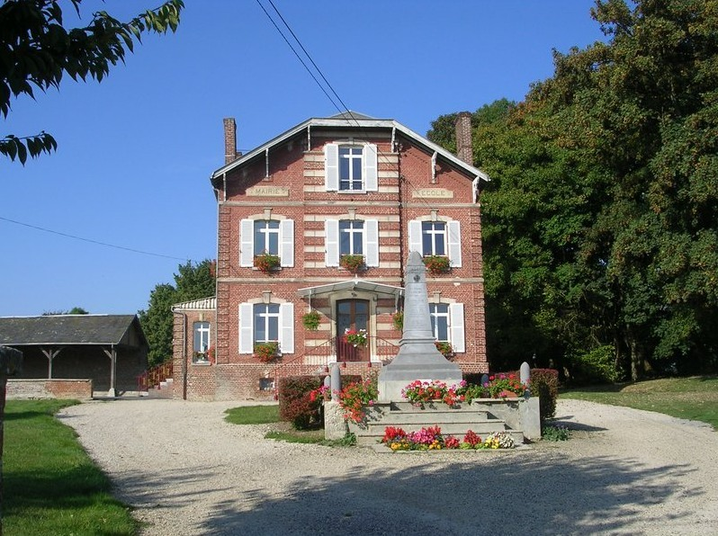 La Maire de Grand-Verly (été 2009)